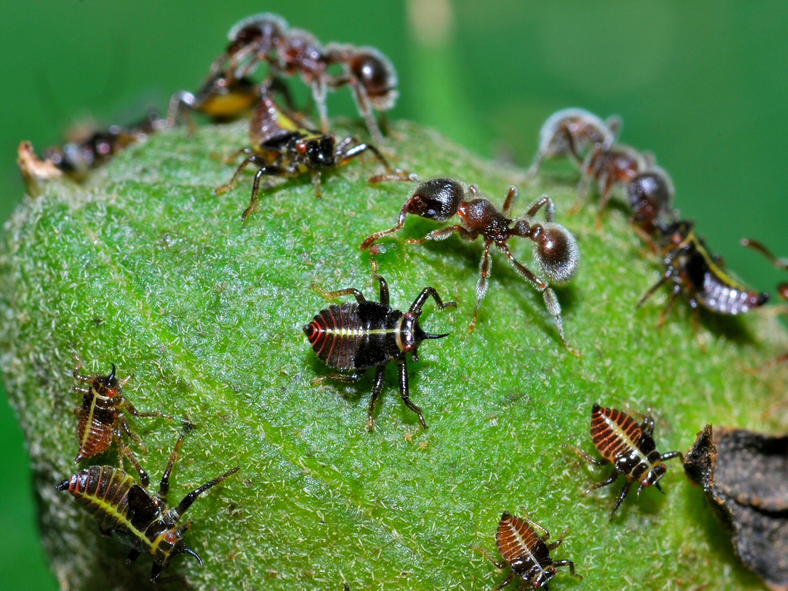 Mabira Forest, UGANDA